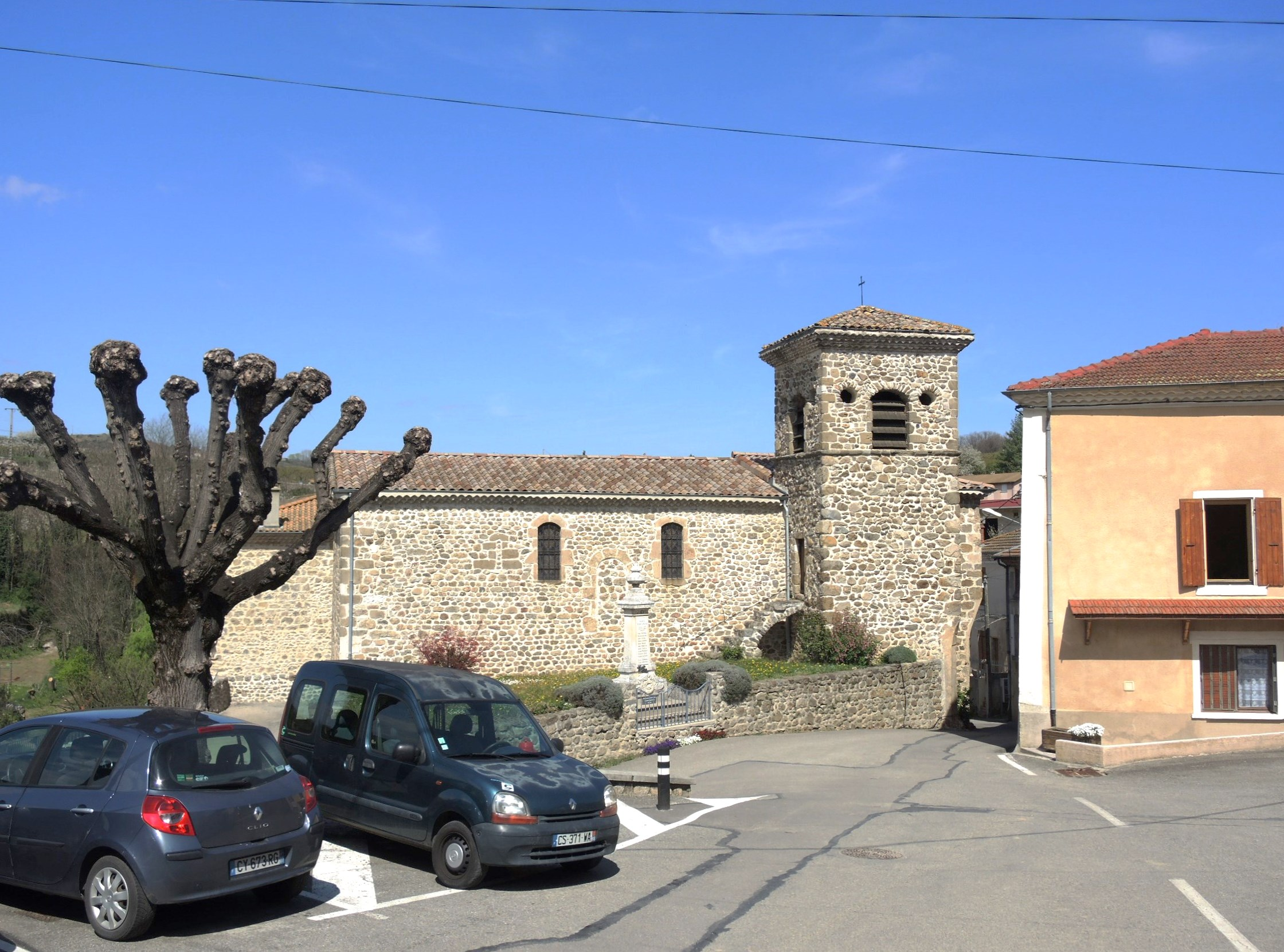 Saint-Etienne-de-Valoux détail